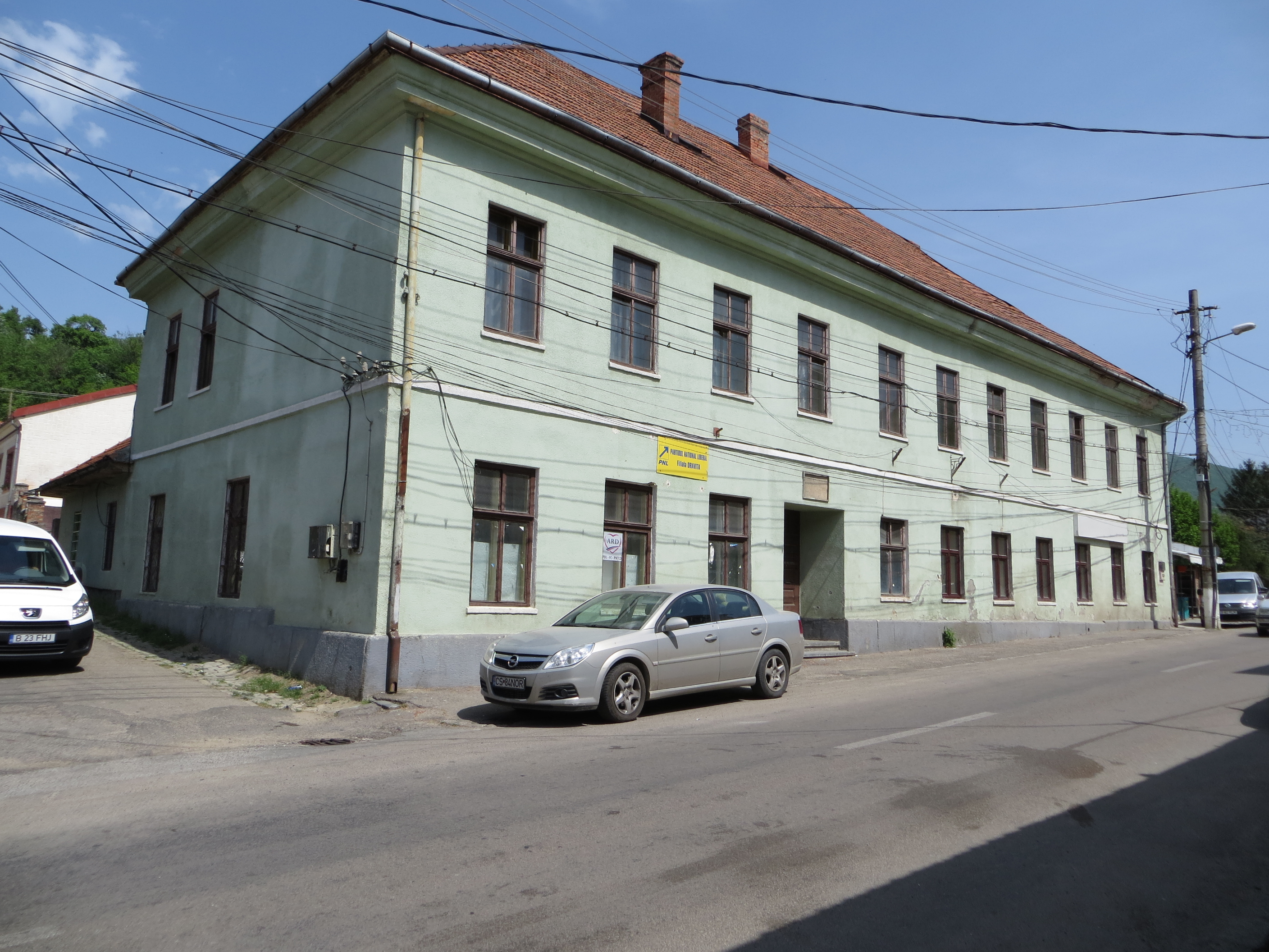 Gimnaziul de fete "Regina Maria", azi Casa Copiilor și a Tinerilor